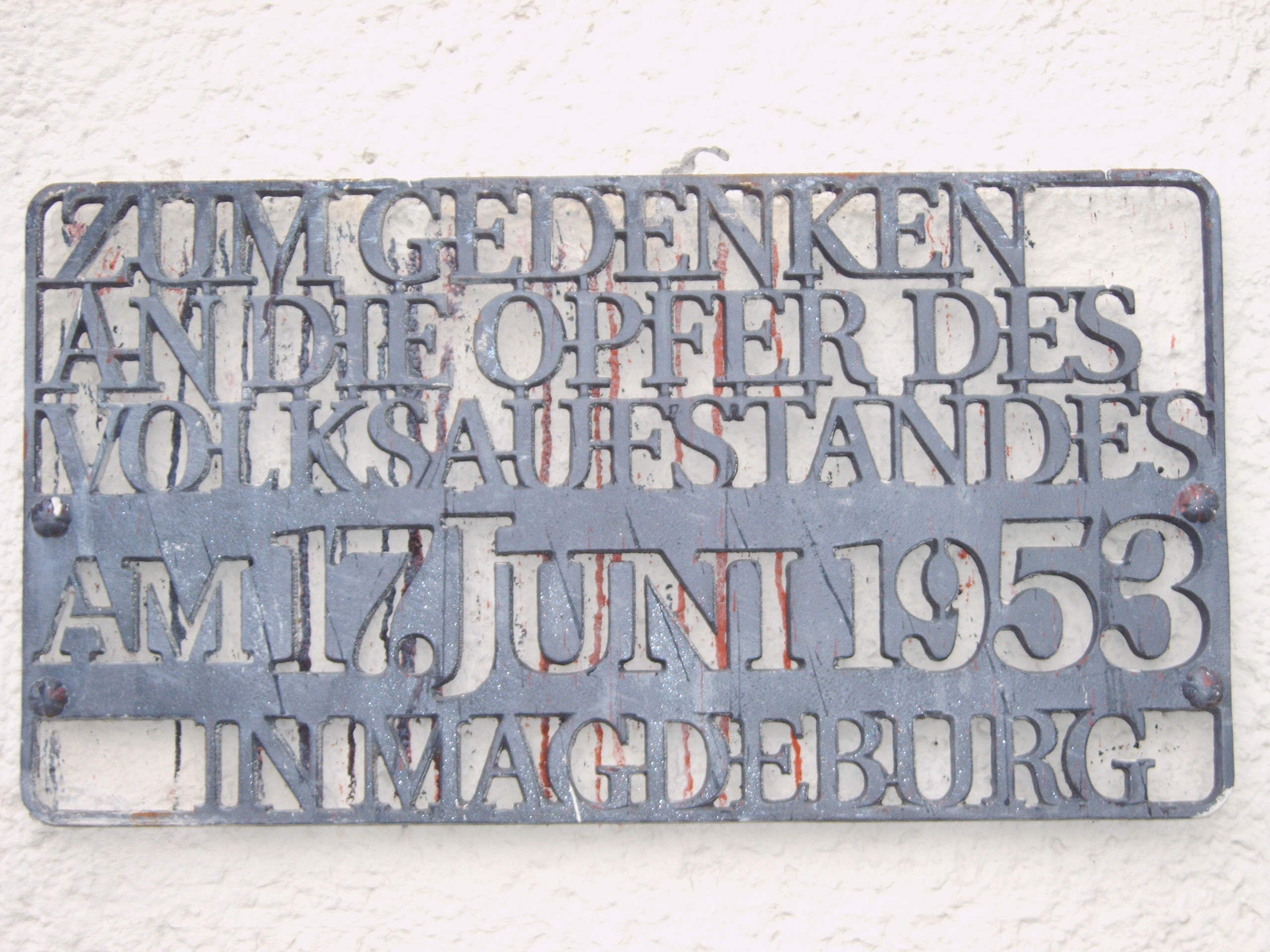 Gedenktafel am Platz des 17. Juni in Magdeburg an den Volksaufstand des 17. Juni